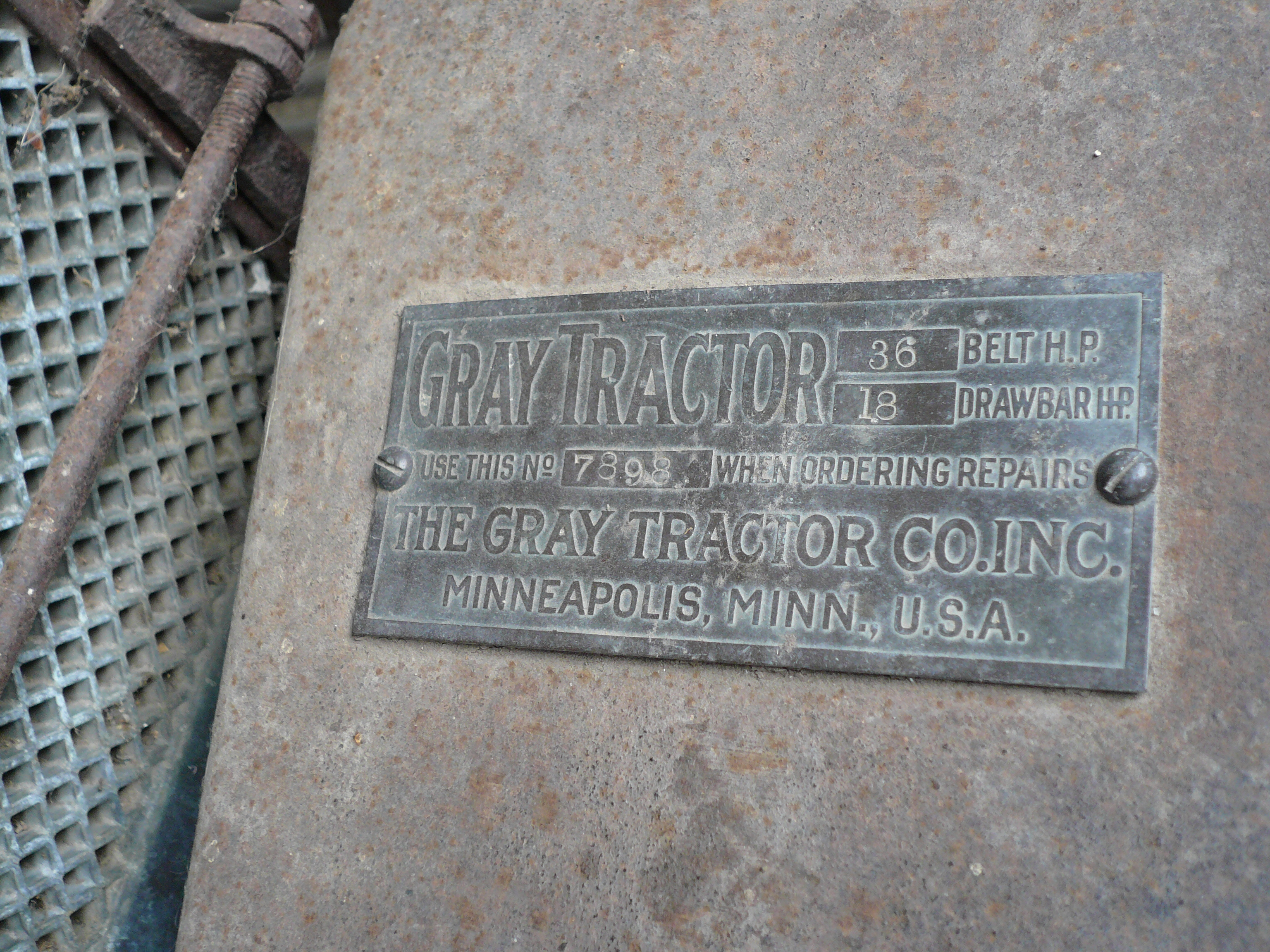 Typrnschild eines Gray Traktors